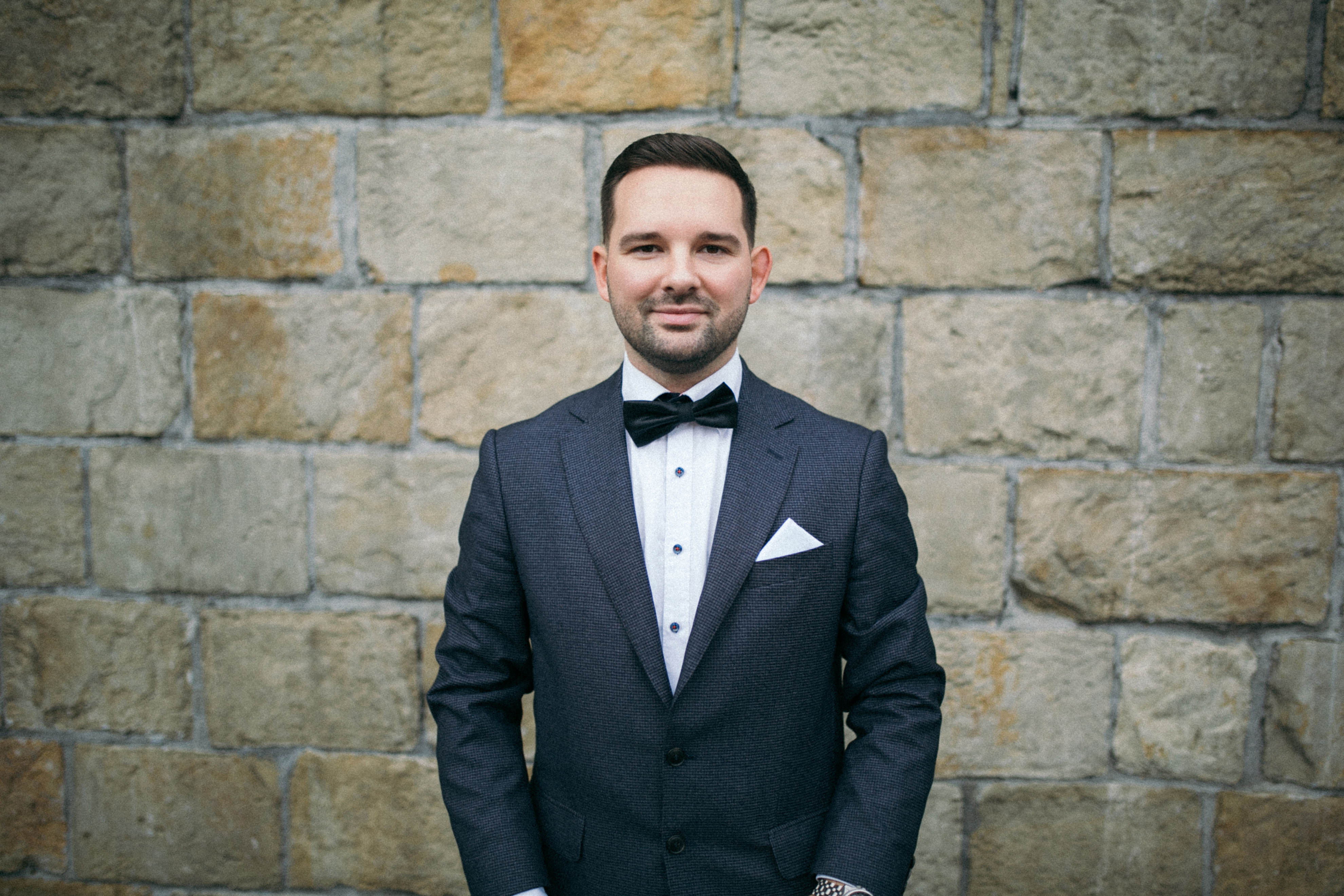 Фото Ростислава Косюри